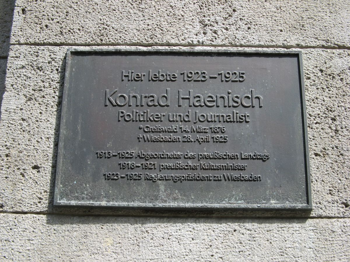 Gedenkplakette für Konrad Haenisch in Wiesbaden